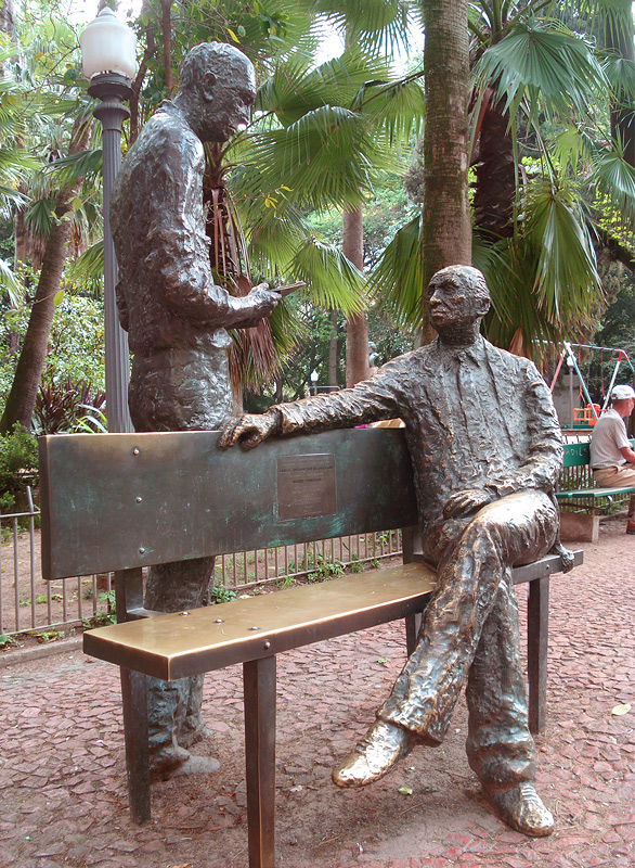 Monumento a Carlos Drummond de Andrade e a Mário Quintana, de autoria de Francisco Stockinger, na Praça da Alfândega, Porto Alegre, Brasil.